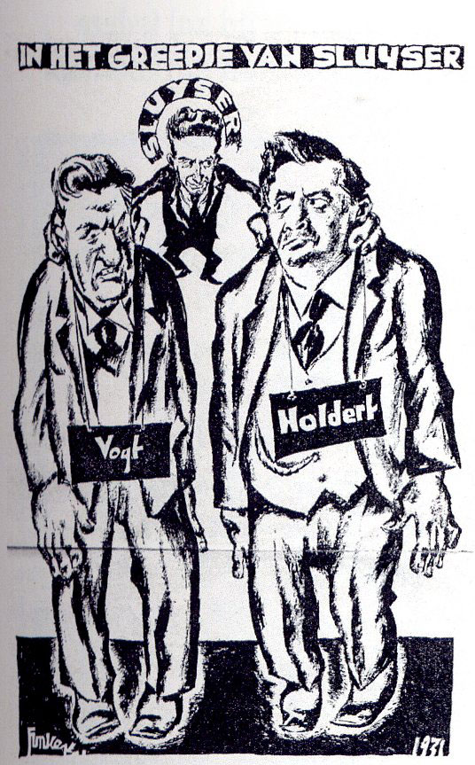 Cartoon met afgebeeld Meyer Sluyser (1901-1973), die een complot tussen de Telegraaf (Holdert) en de AVRO (Vogt) bloot legt